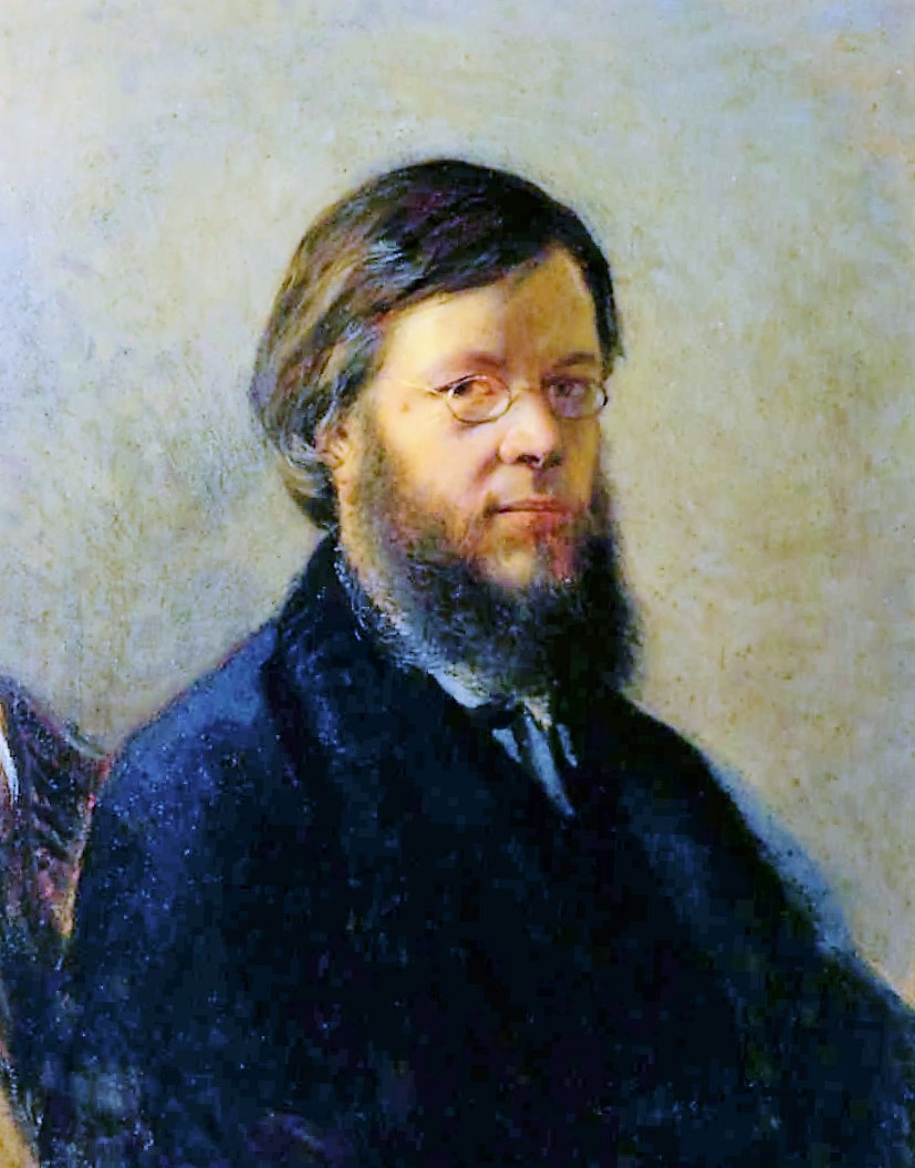 Aleksandr Nikolaevič Pypin (1833-1904), cugino materno di Nikolaj Černyševskij